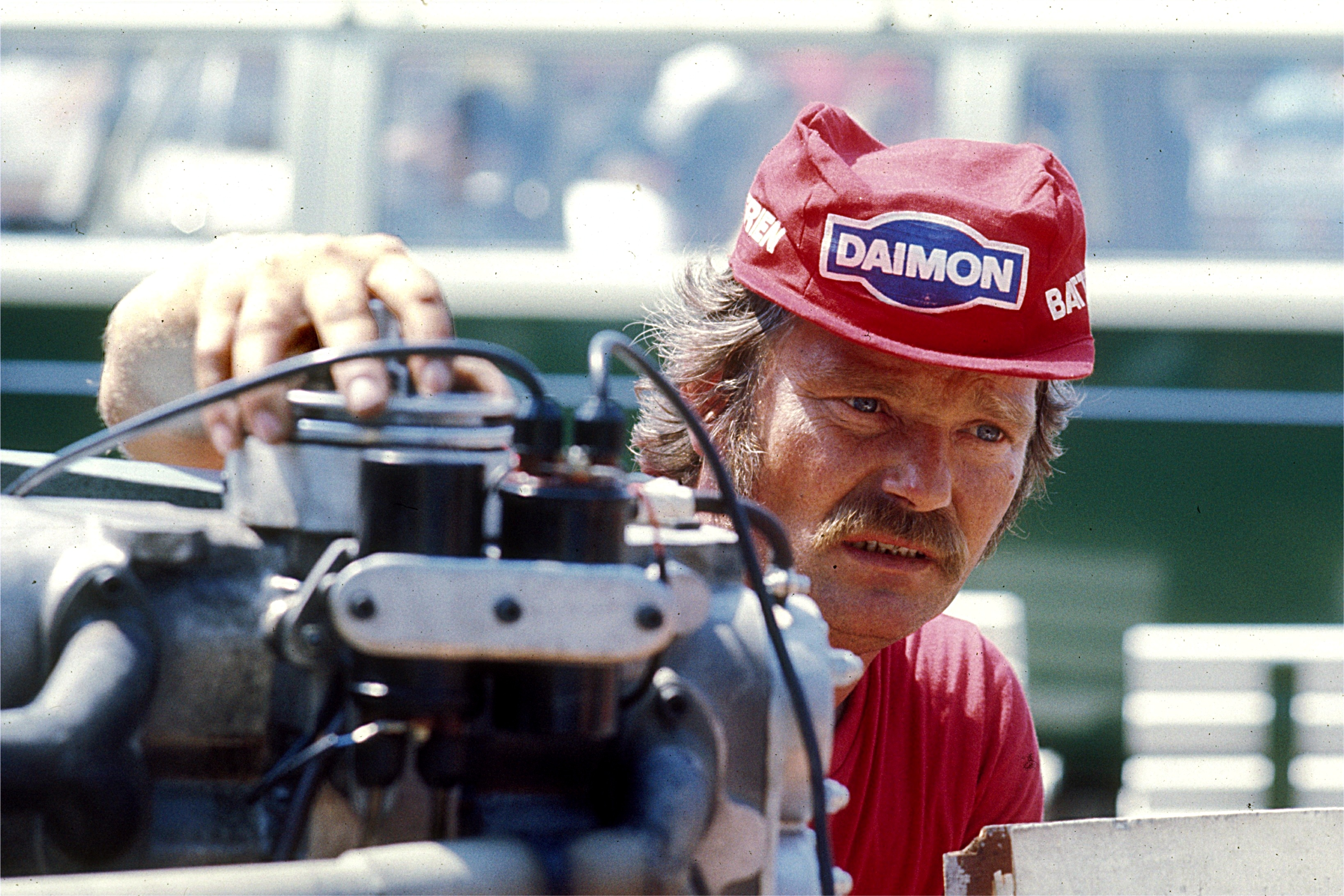 Kurt Mischke, Motorbootrennfahrer, Weltmeister 1976